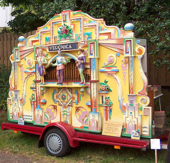 Zelf genomen foto Gemaakt op 31 mei 2004, draaiorgel festival in Haarlem.